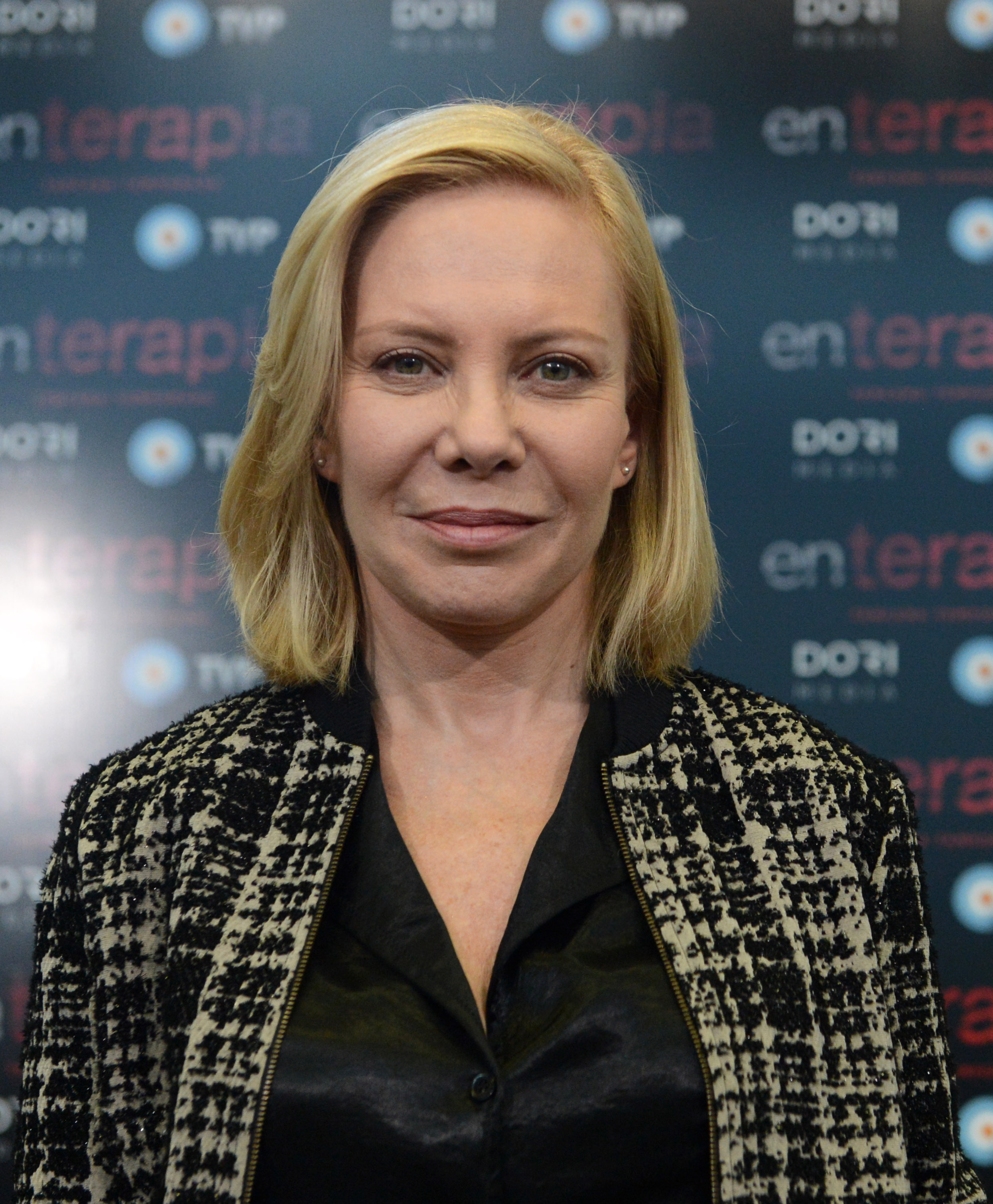 La actriz Cecilia Roth en 2014